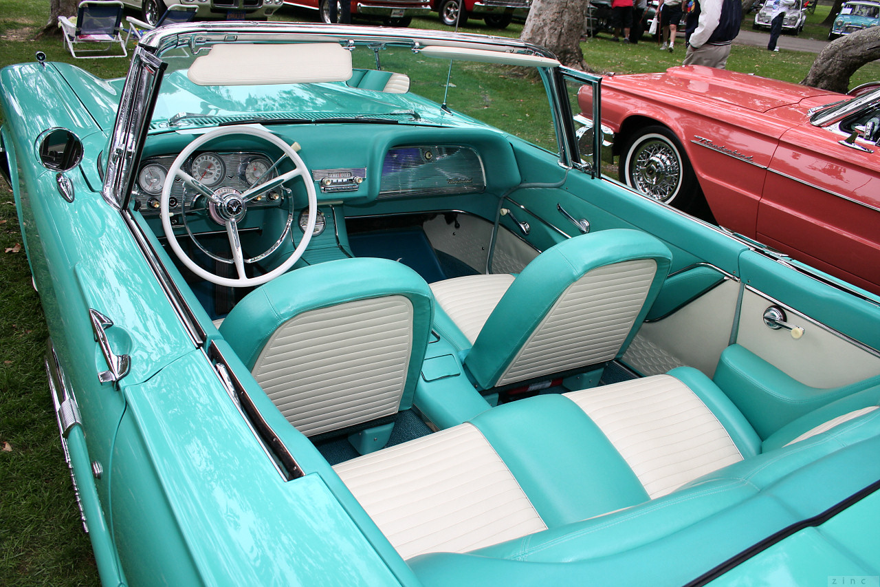 1959 Ford Thunderbird cnv - turquoise - int